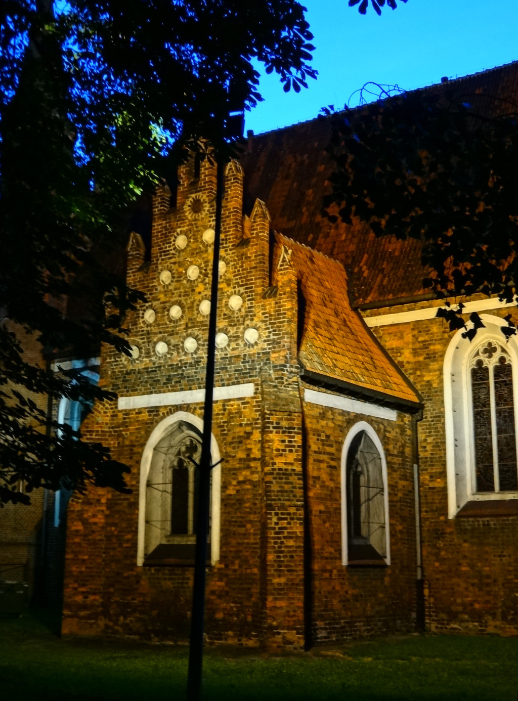 Kościół pobernardyński p.w. Najświętszej Maryi Panny Królowej Pokoju, zbud. 1552-1557, do 1830 kościół klasztorny bernardynów bydgoskich, od 1866 r. garnizonowy; na zdj. kaplica św. Anny